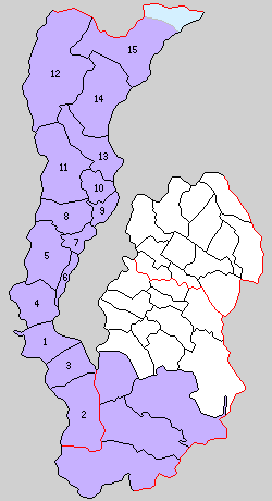 滋賀県滋賀郡の町村制時点の町村。